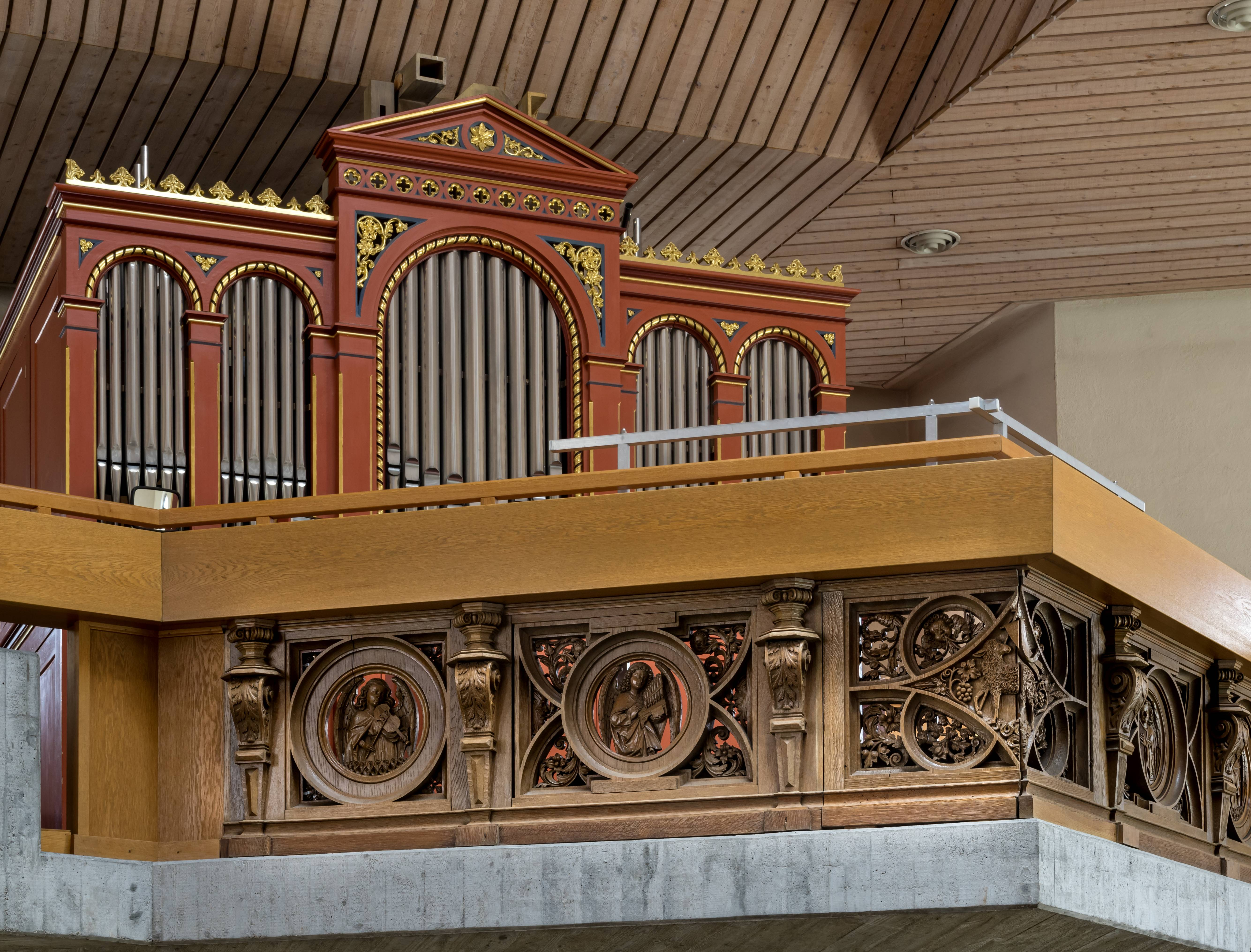 Bilder von St. Columba. in Pfaffenweiler Die Schnitzereien an der Empore und die Orgel